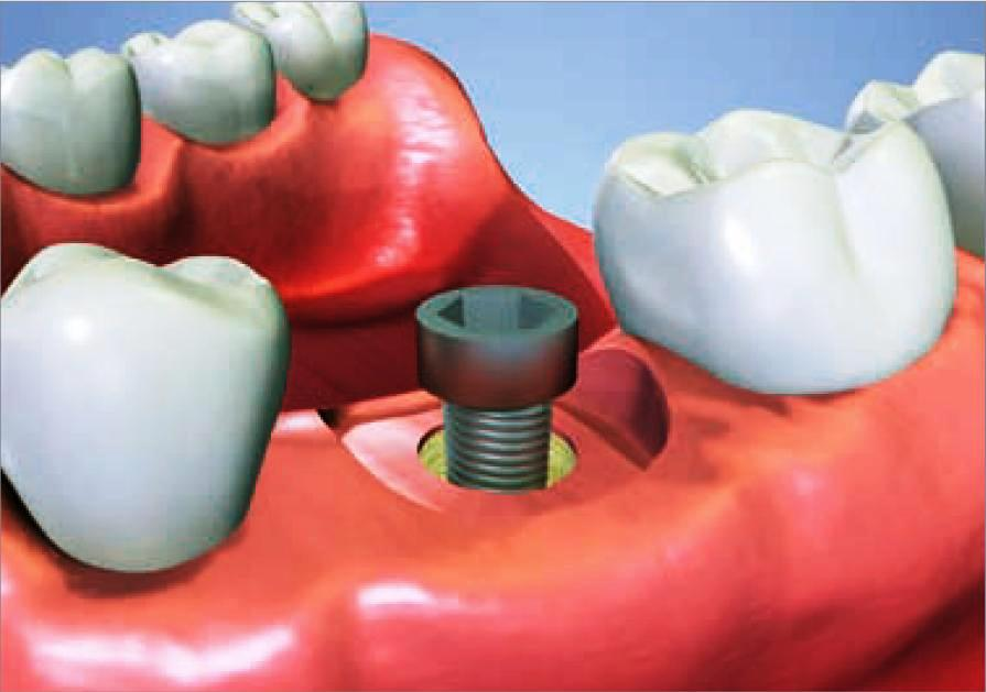 postup implantace3